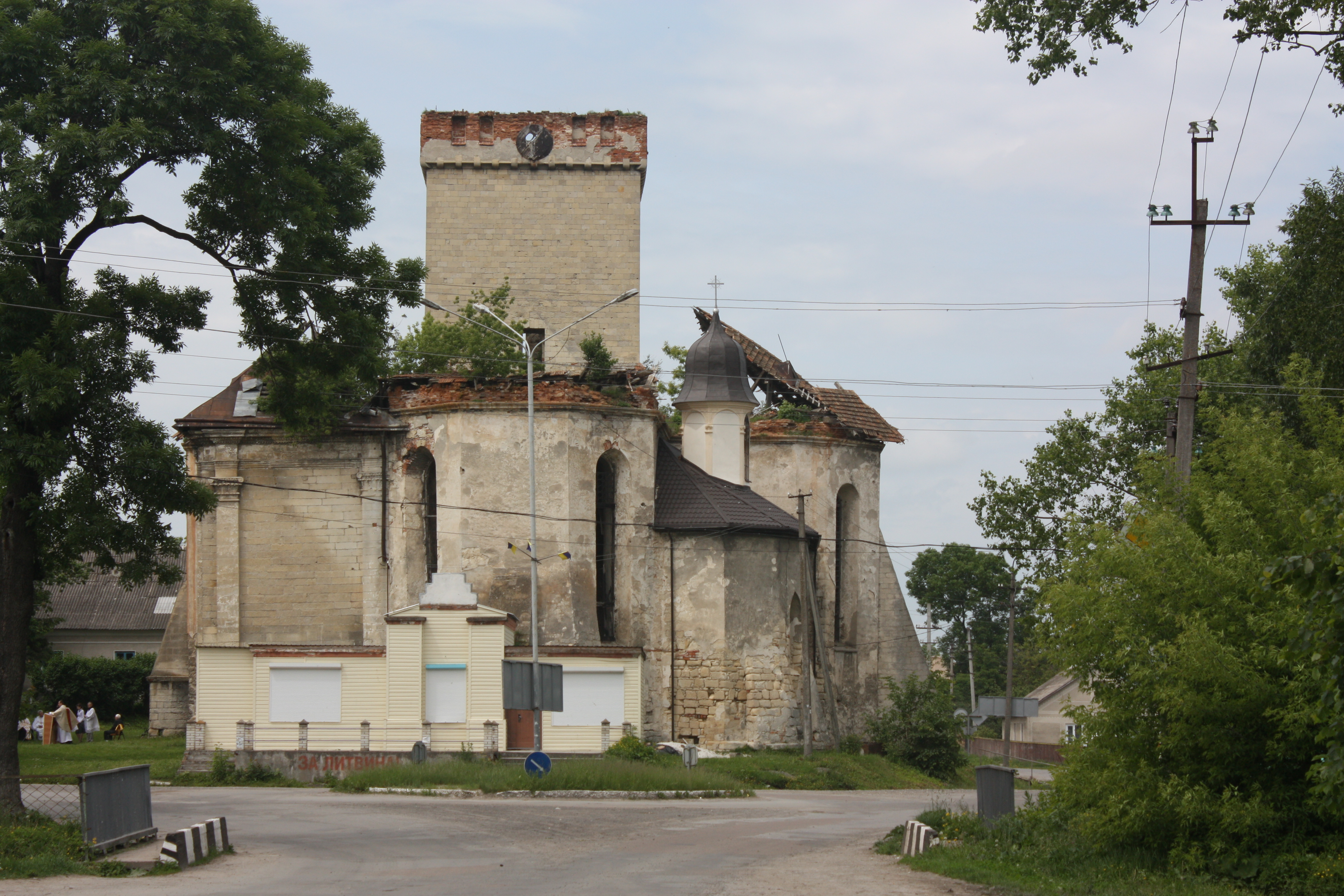 Kościół w Podhajcach widok od wschodu stan 2010